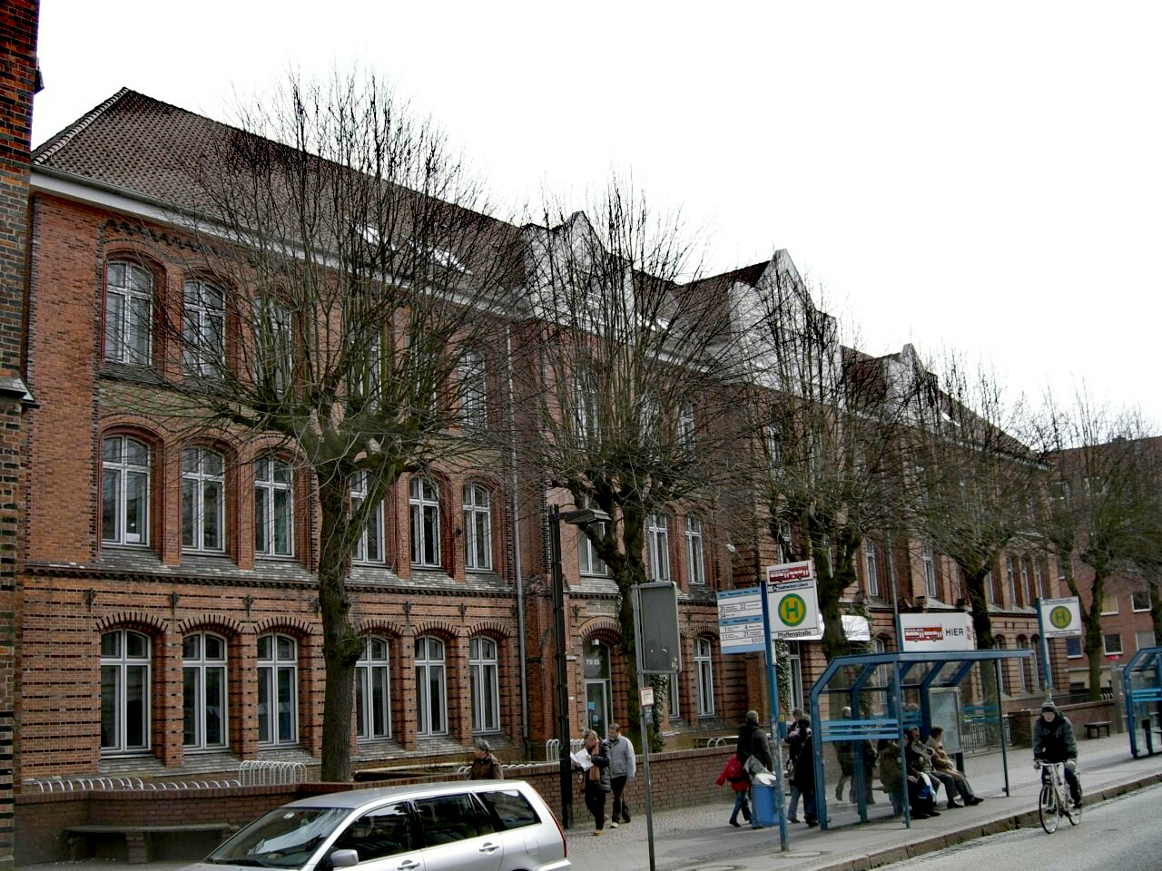 Katharineum zu Lübeck, eigene Aufnahme 2005